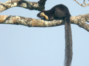 Ratufa_bicolor2.jpg